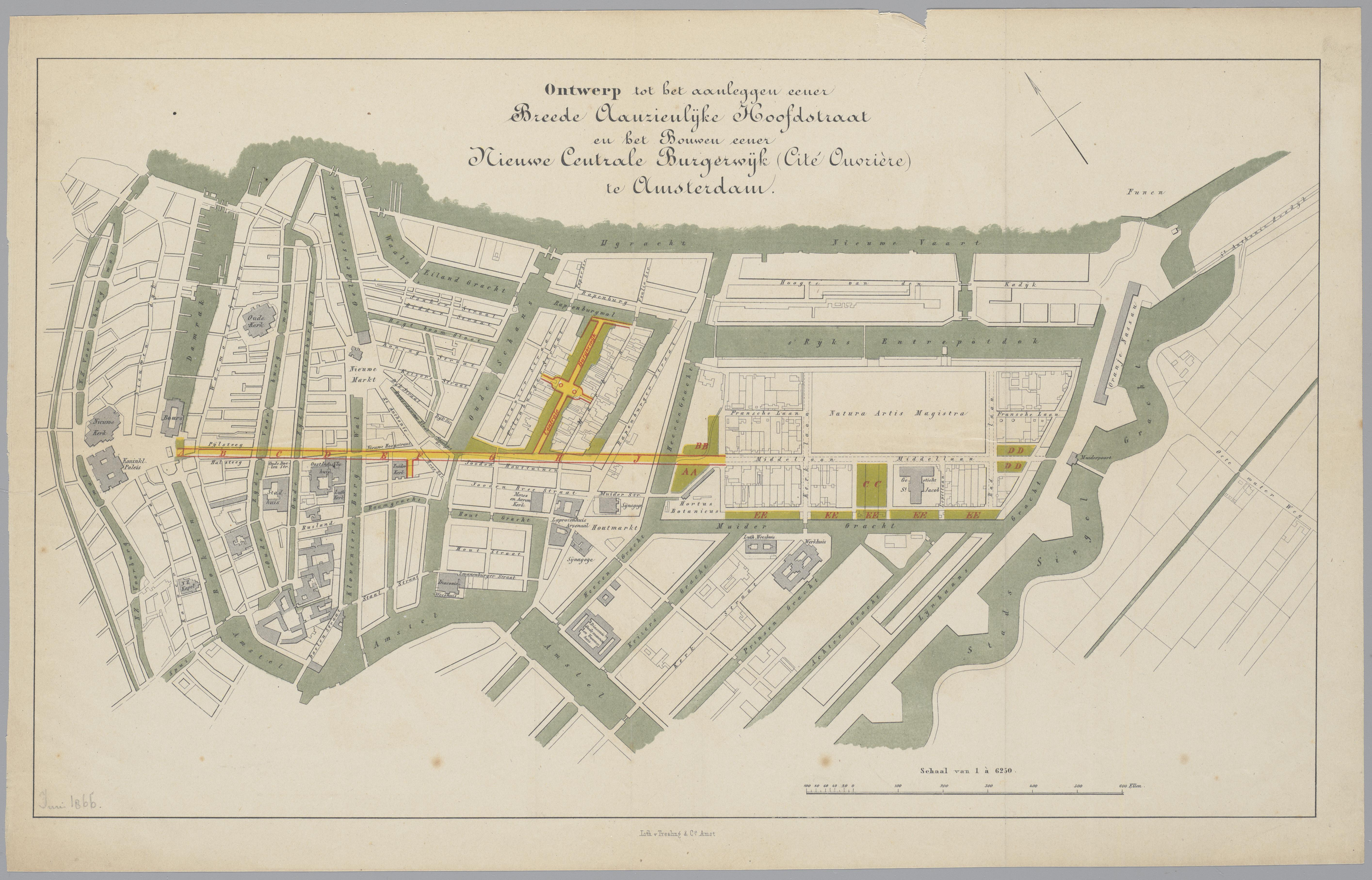 Een ontwerp voor een nieuwe brede hoofdstraat te Amsterdam. Ontwerp van Outshoorn en Kuinders, 1864